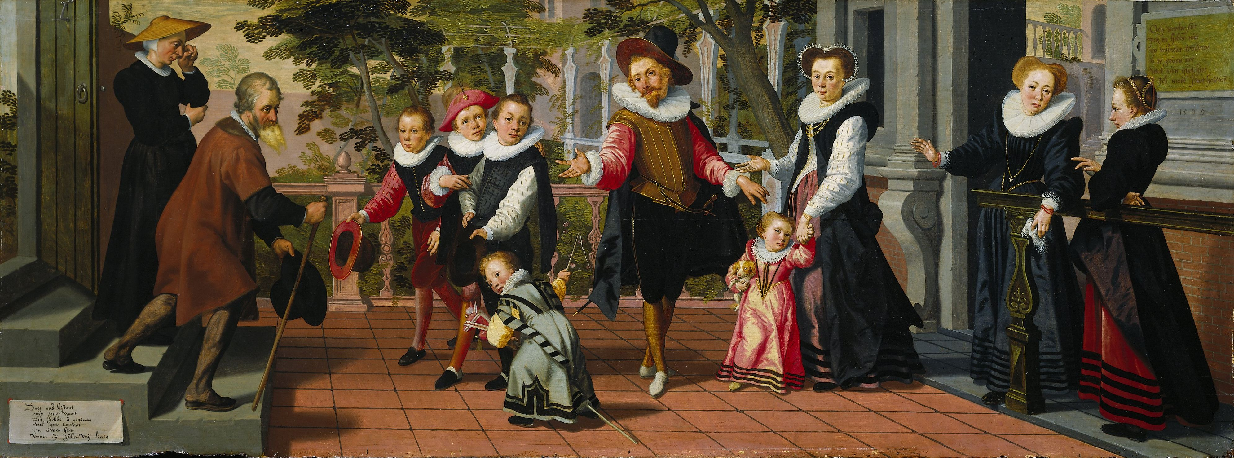 Rijke kinderen, arme ouders. Op een terras staat rechts een rijk echtpaar met vijf kinderen, links komen de arme ouders de trap af. Een van de kinderen speelt met een stokpaard, een ander heeft een hondje onder de arm. Rechts bij een hek kijken twee vrouwen toe. De door de vader en zoon uitgesproken teksten staan als opschriften op bordjes.; Pieter Pietersz (ca. 1540–1603) of Aert Pietersz (ca. 1550–1612), olieverf op paneel, 1599